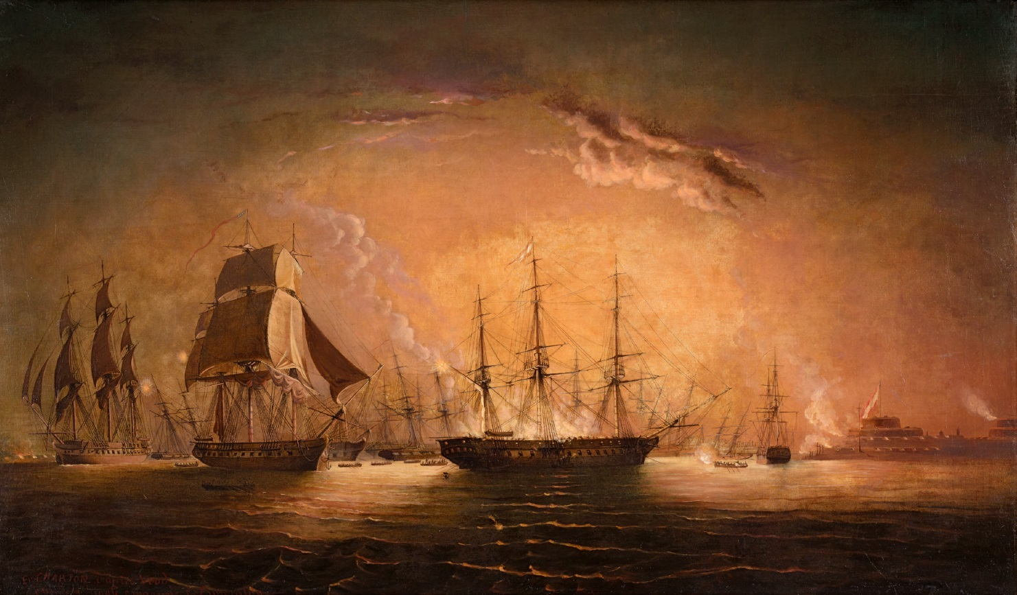 La escena describe la captura de la fragata española Esmeralda en el puerto del Callao el 6 de noviembre de 1820 por la fuerzas chilenas al mando de lord Cochrane